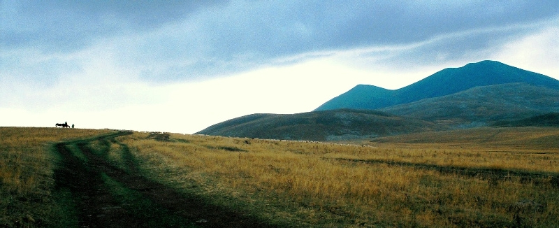 mountain didi abuli by r. beridze